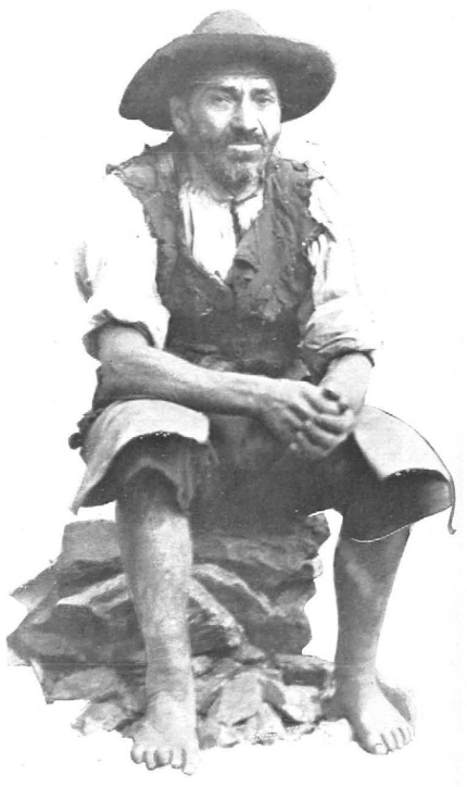 Tipo de las Jurdes, obra del fotógrafo Venancio Gombau, recogido en la revista española La ilustración española y americana.